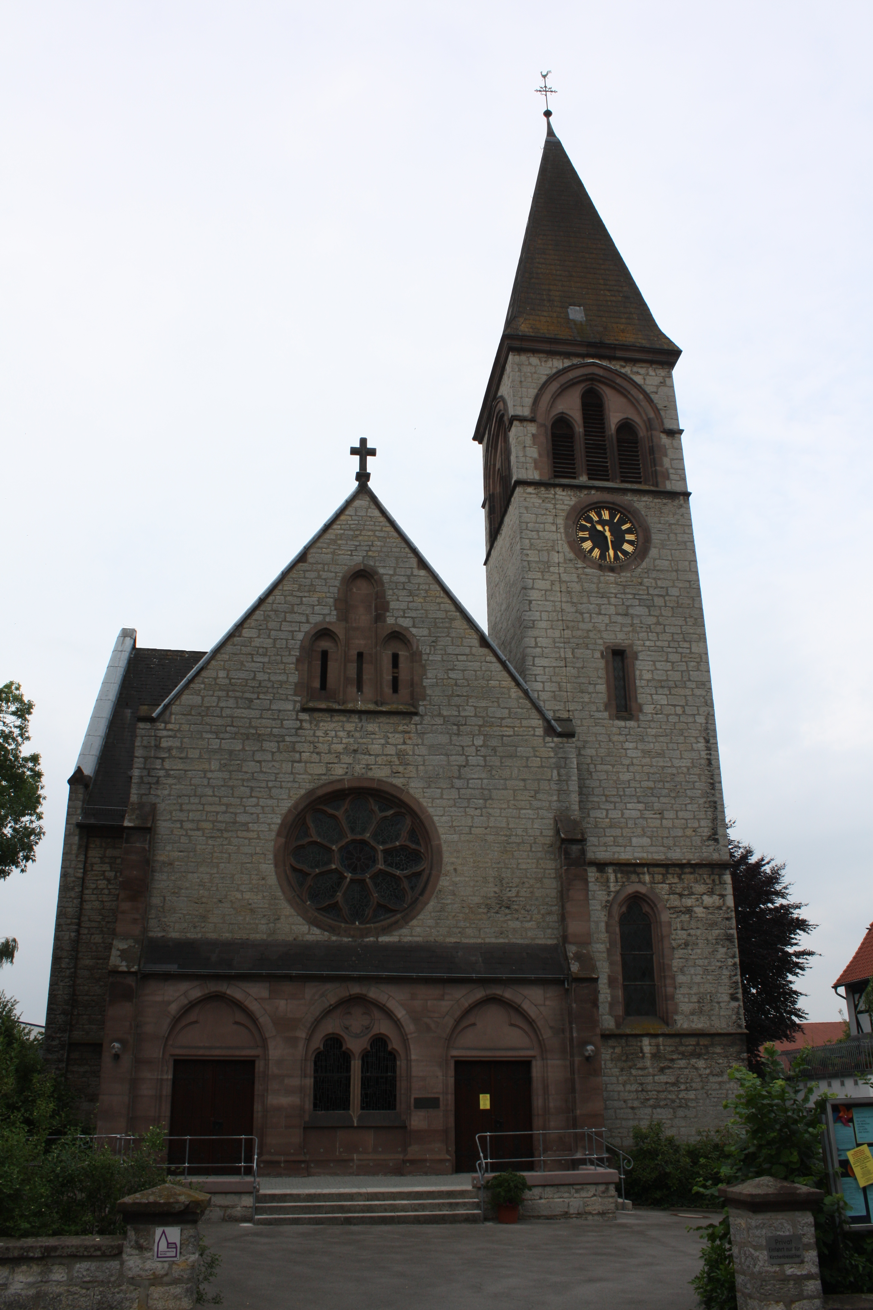 Evangelische Auferstehungskirche in Brakel, errichtet 1911-1912